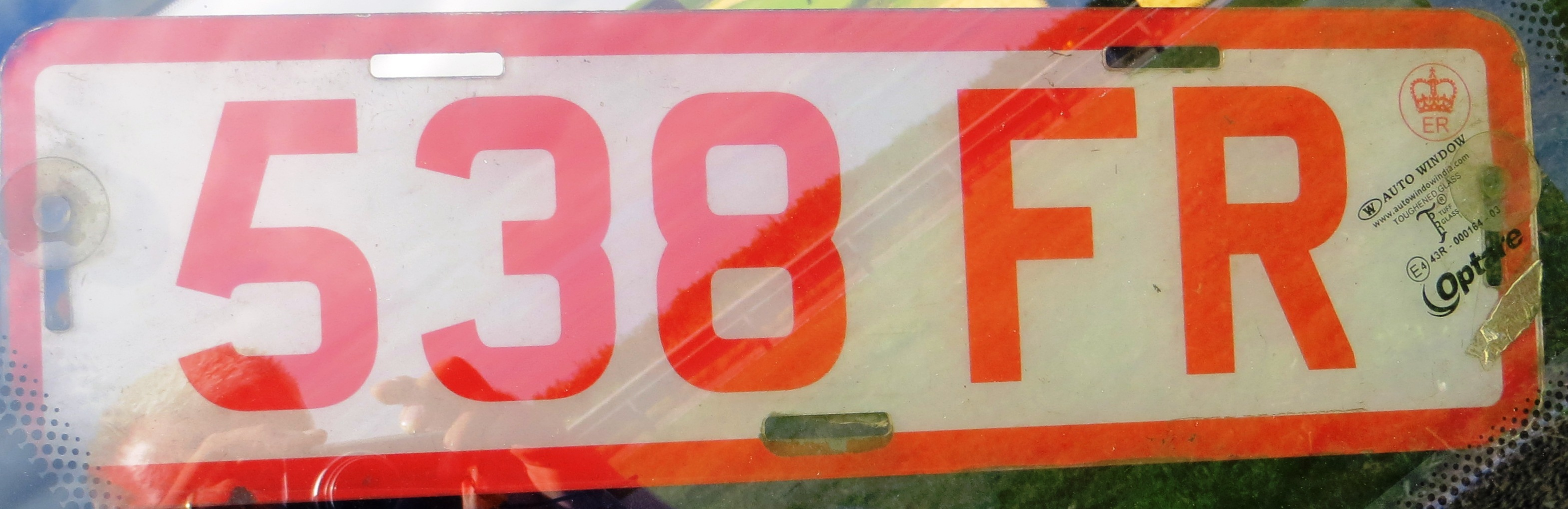 UK handelaars kenteken